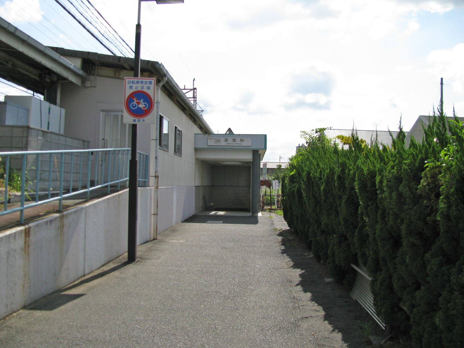 近鉄真菅駅